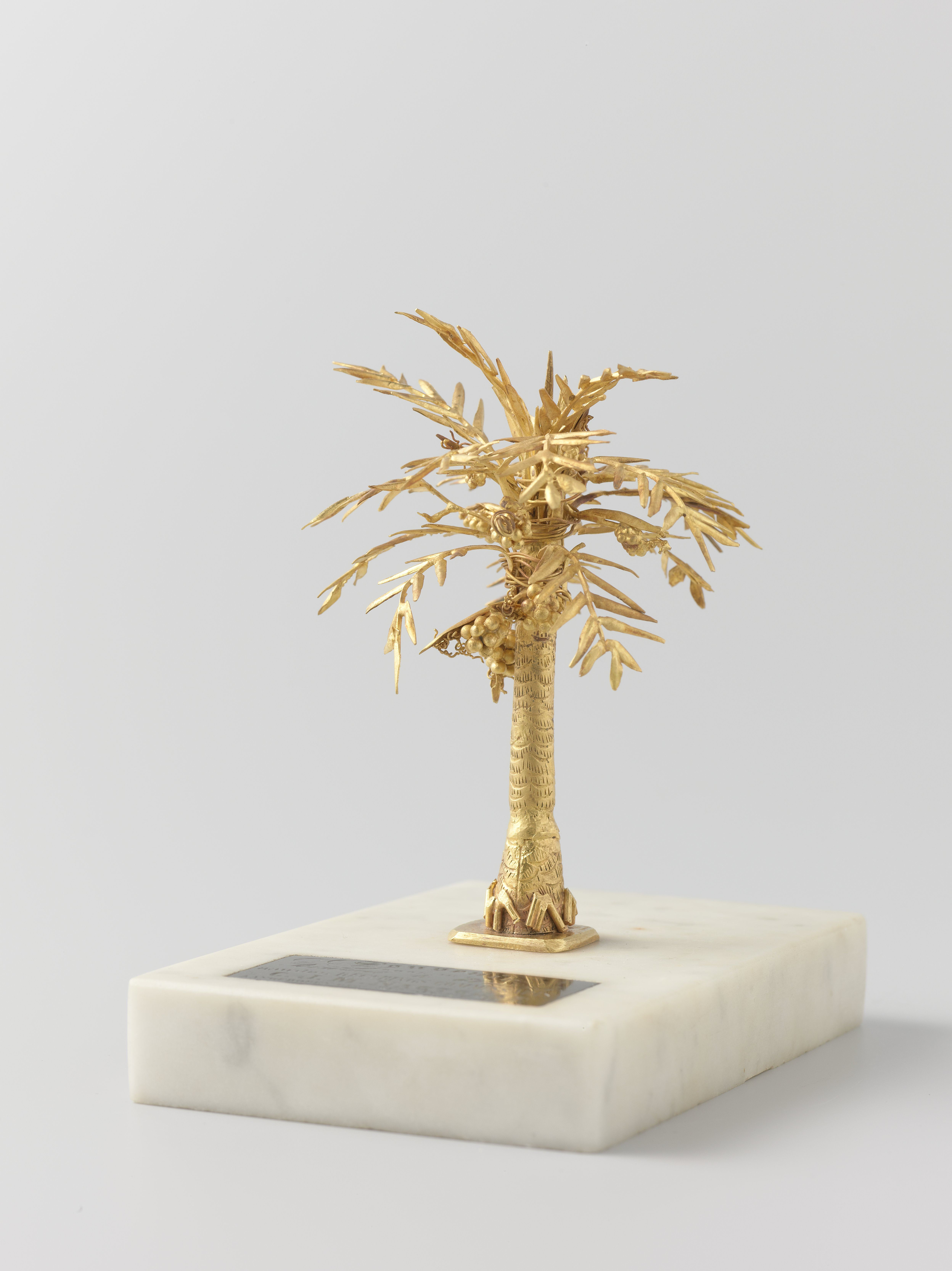 Palmboom geschonken aan C.J.M. Nagtglas, anonymous, 1871